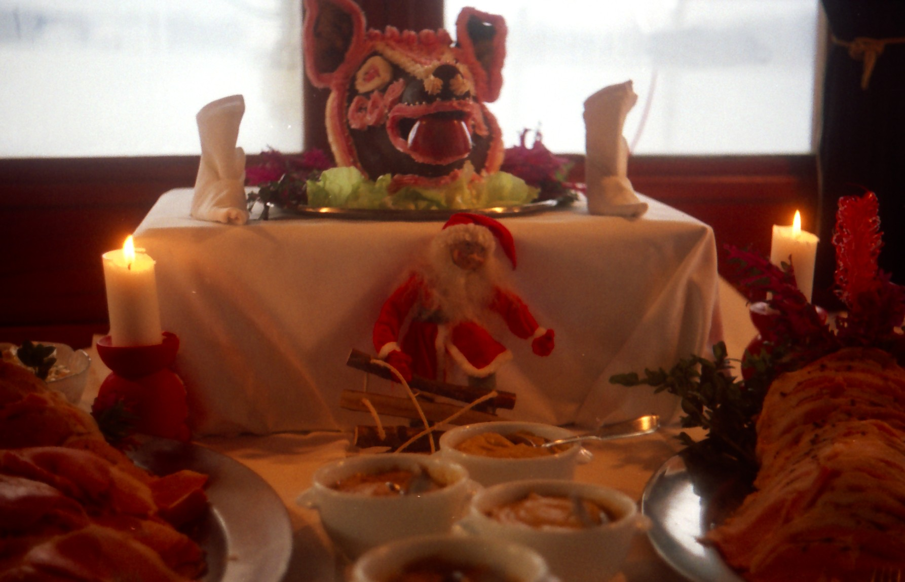 Julbord på "Gustavsberg VII" 1990